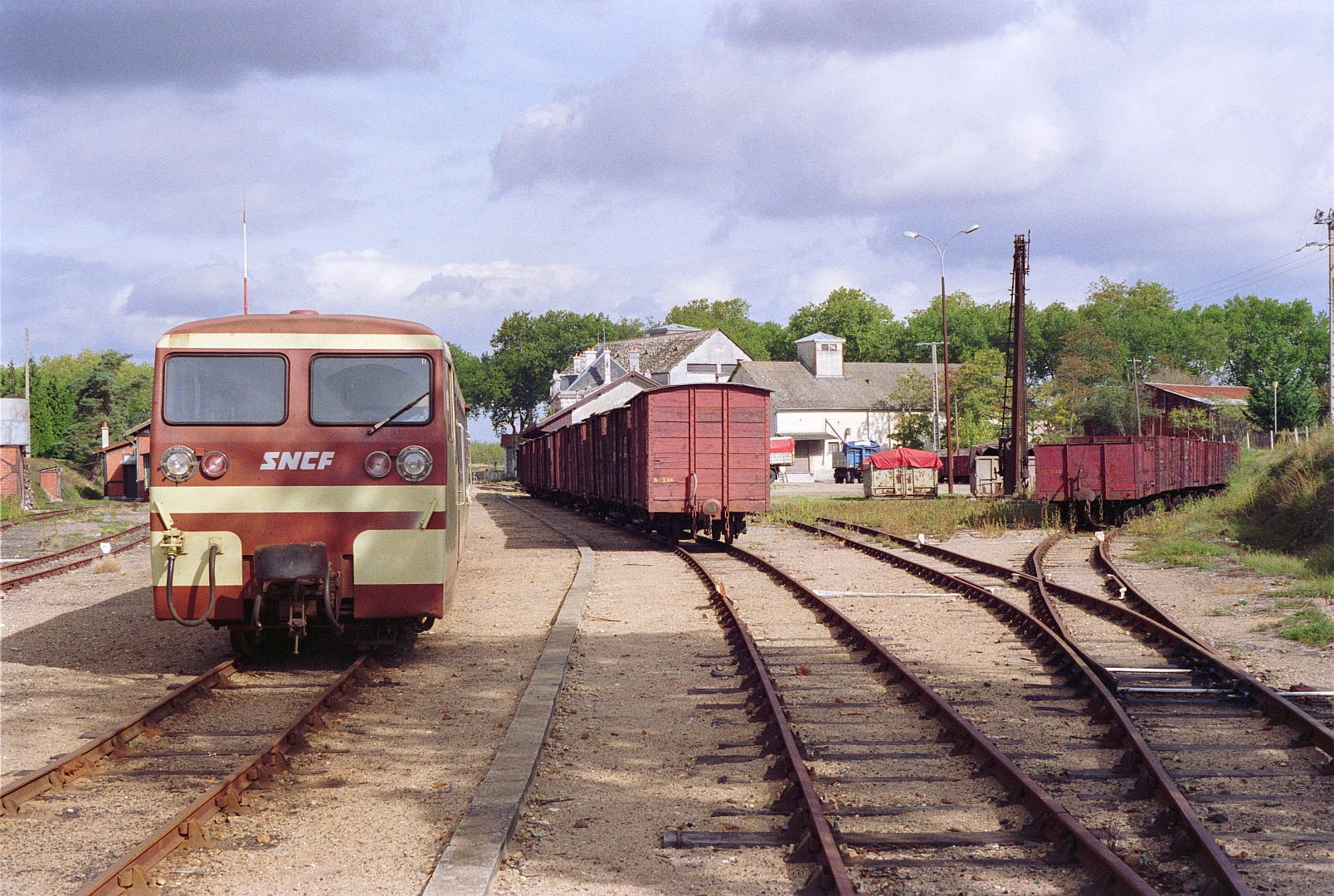 L'autorail Verney X213 en gare de Valençay le 14 ocotbre 1989.